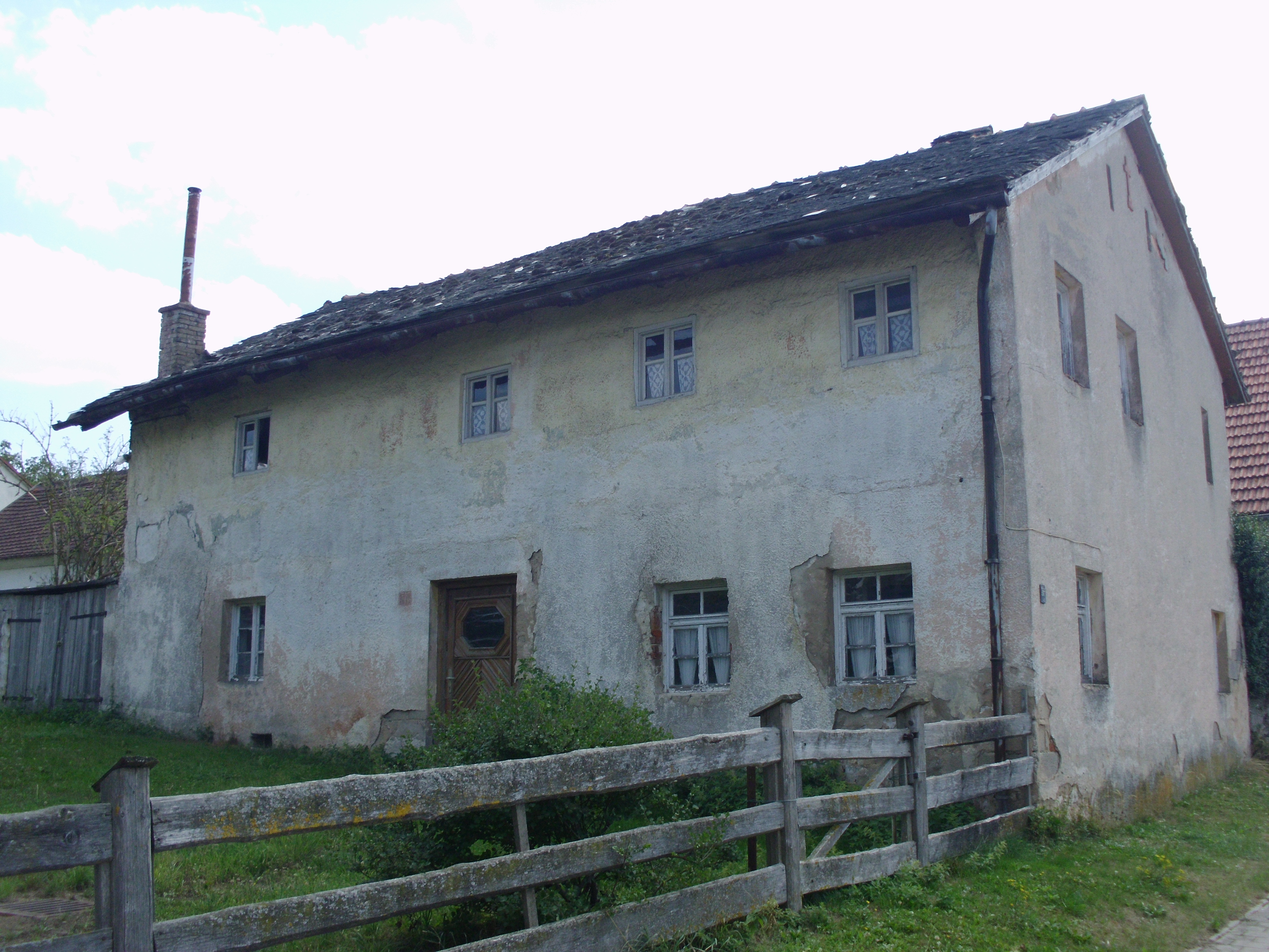 Euerwang, Ortsteil von Greding im mittelfränkischen Landkreis Roth in Bayern, Jurahaus